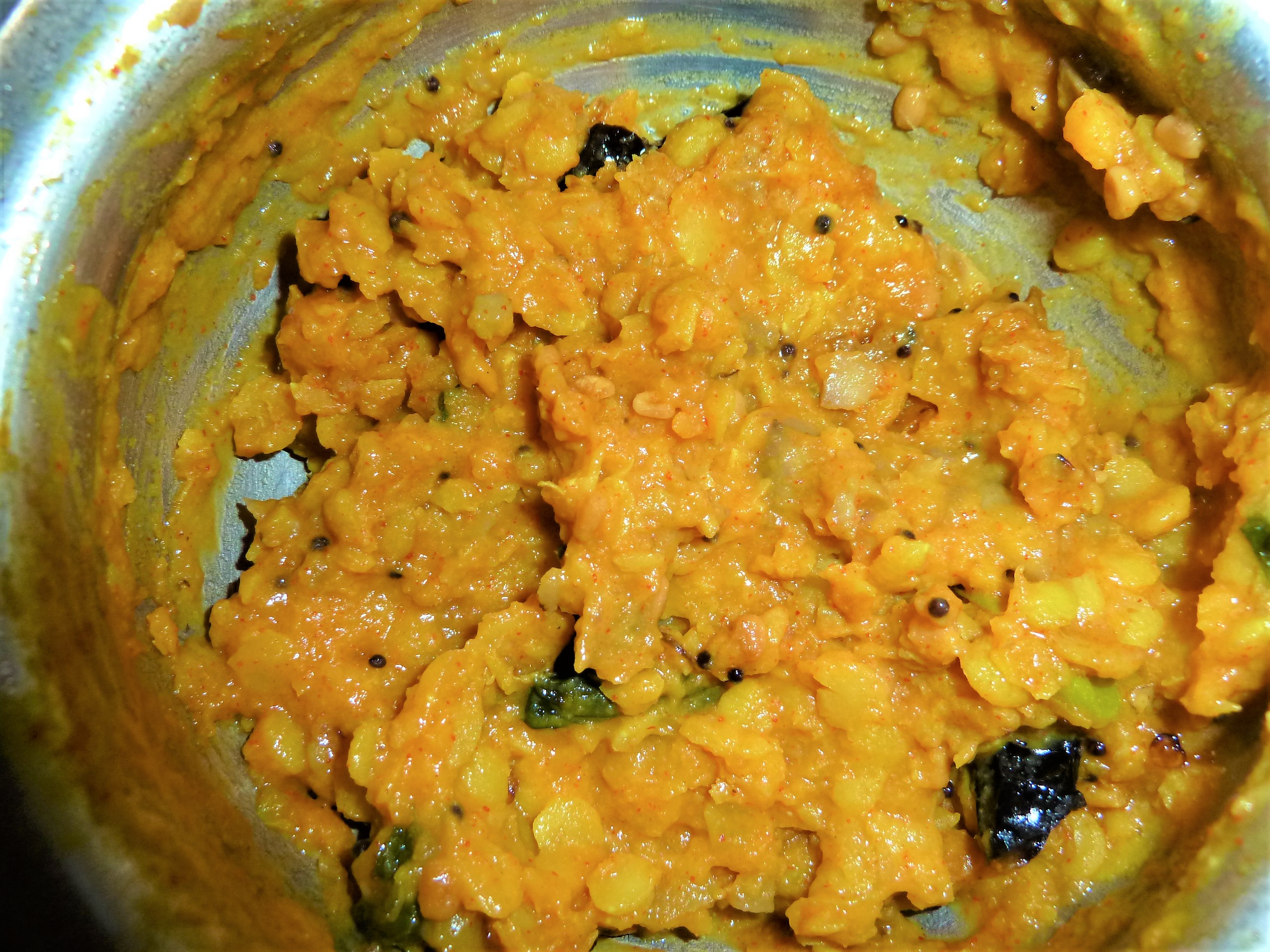 మామిడి పిందెలతో చేసిన పప్పు